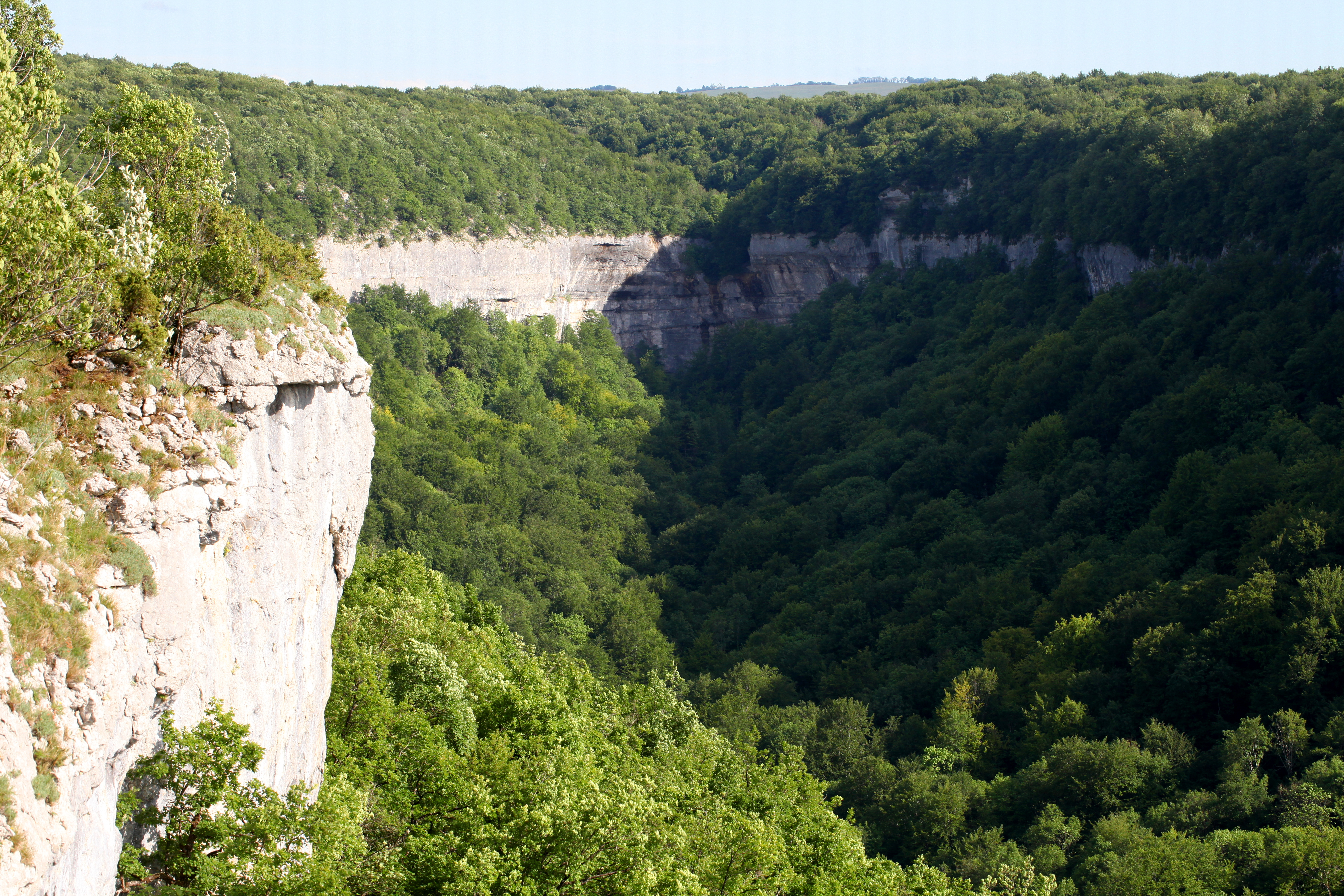 Le fond de la reculée jurassienne du ravin de Valbois.